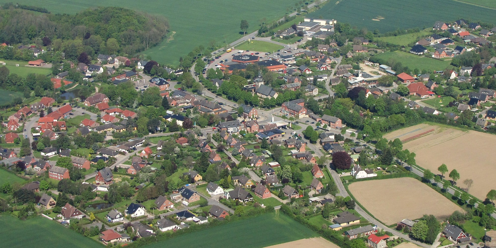 Luftbild Steinbergkirche an der B 199 Amt Gelting in Angeln im Kreis Schleswig-Flensburg Schleswig-Holstein Foto Wolfgang Pehlemann Steinberg IMG_6424